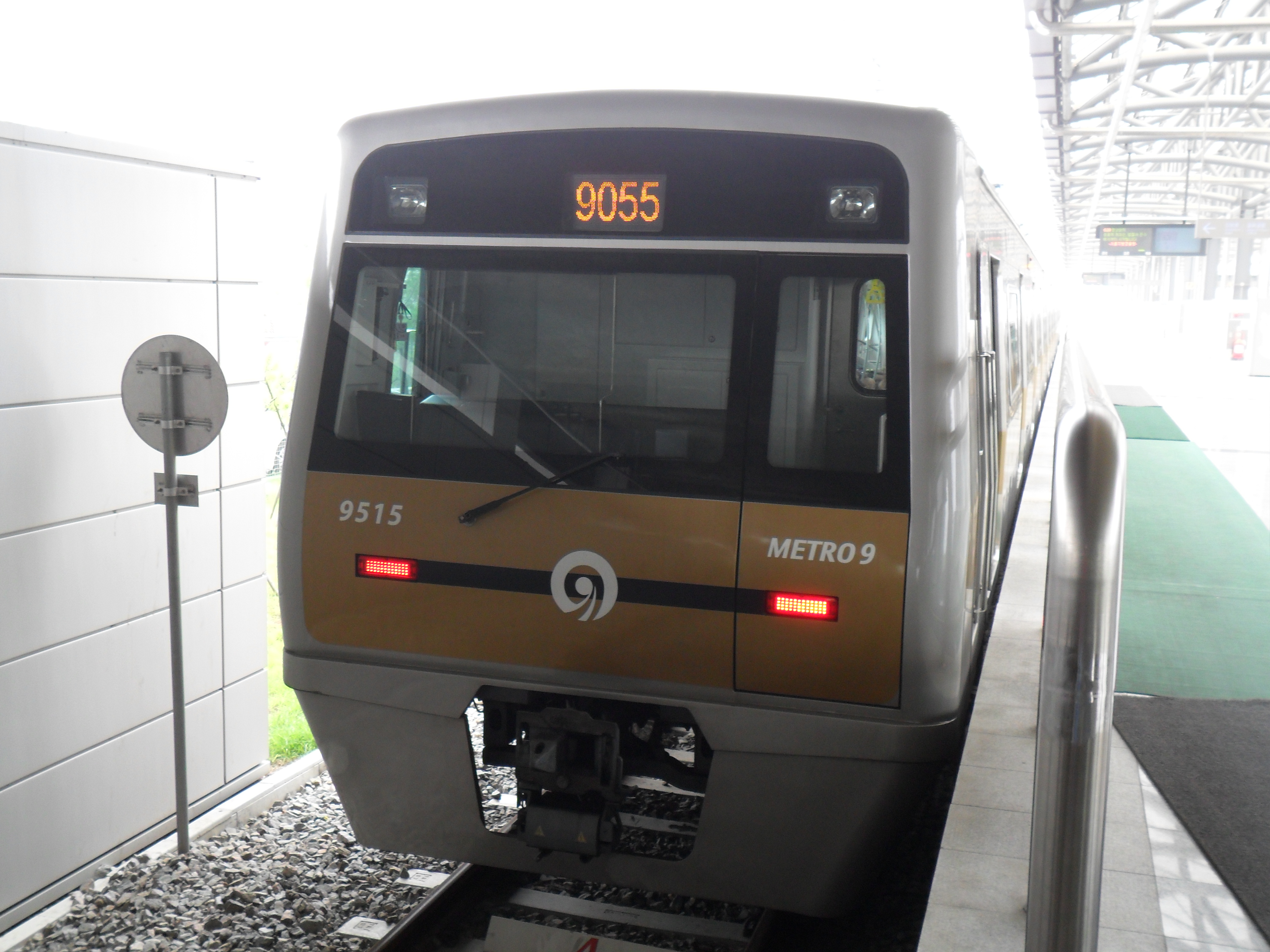 개화역에 대기중인 915편성